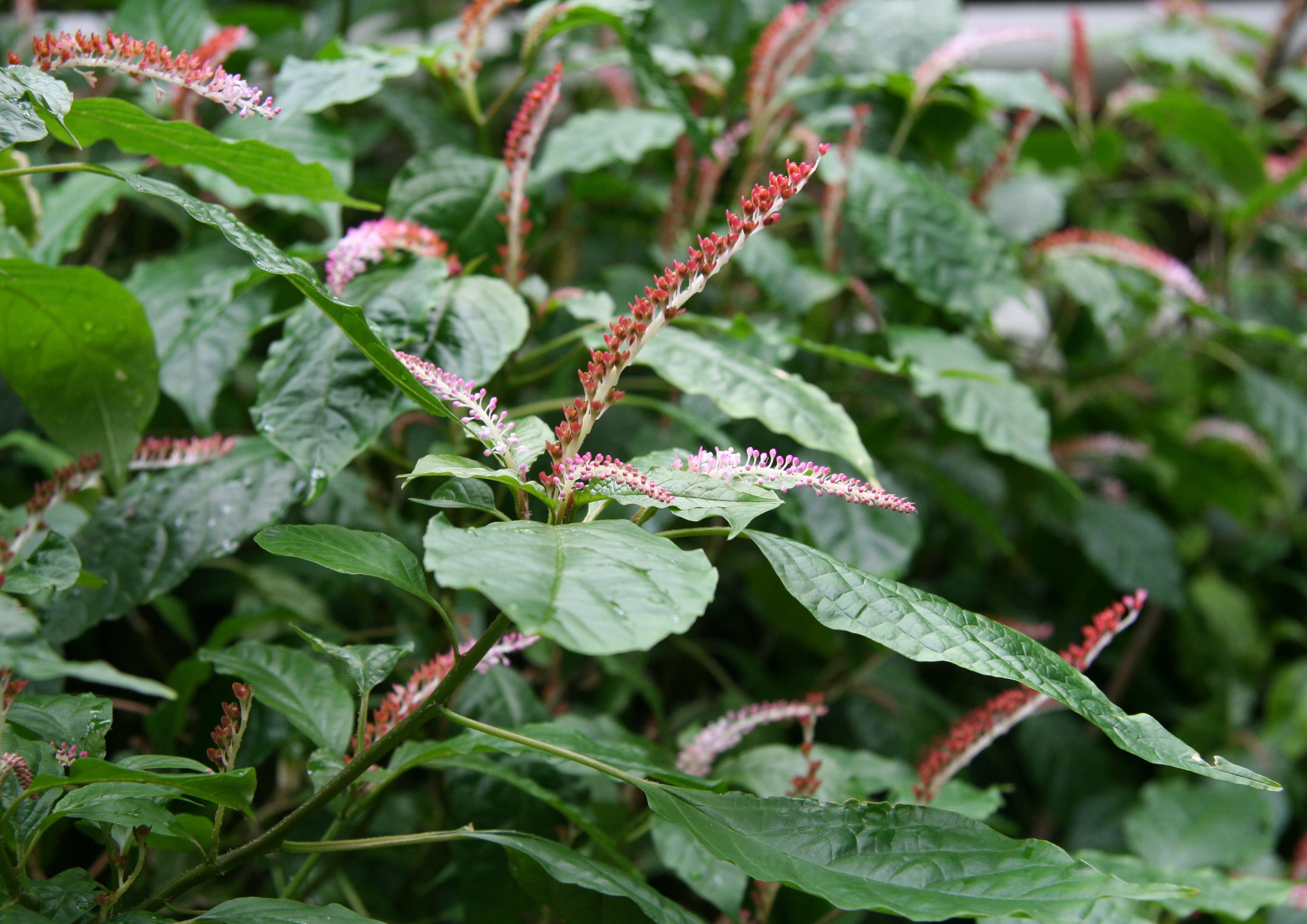 Hilleria latifolia im Botanischen Garten Dresden